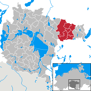 Amt Möllenhagen in Mecklenburg-Western Pomerania - District Müritz